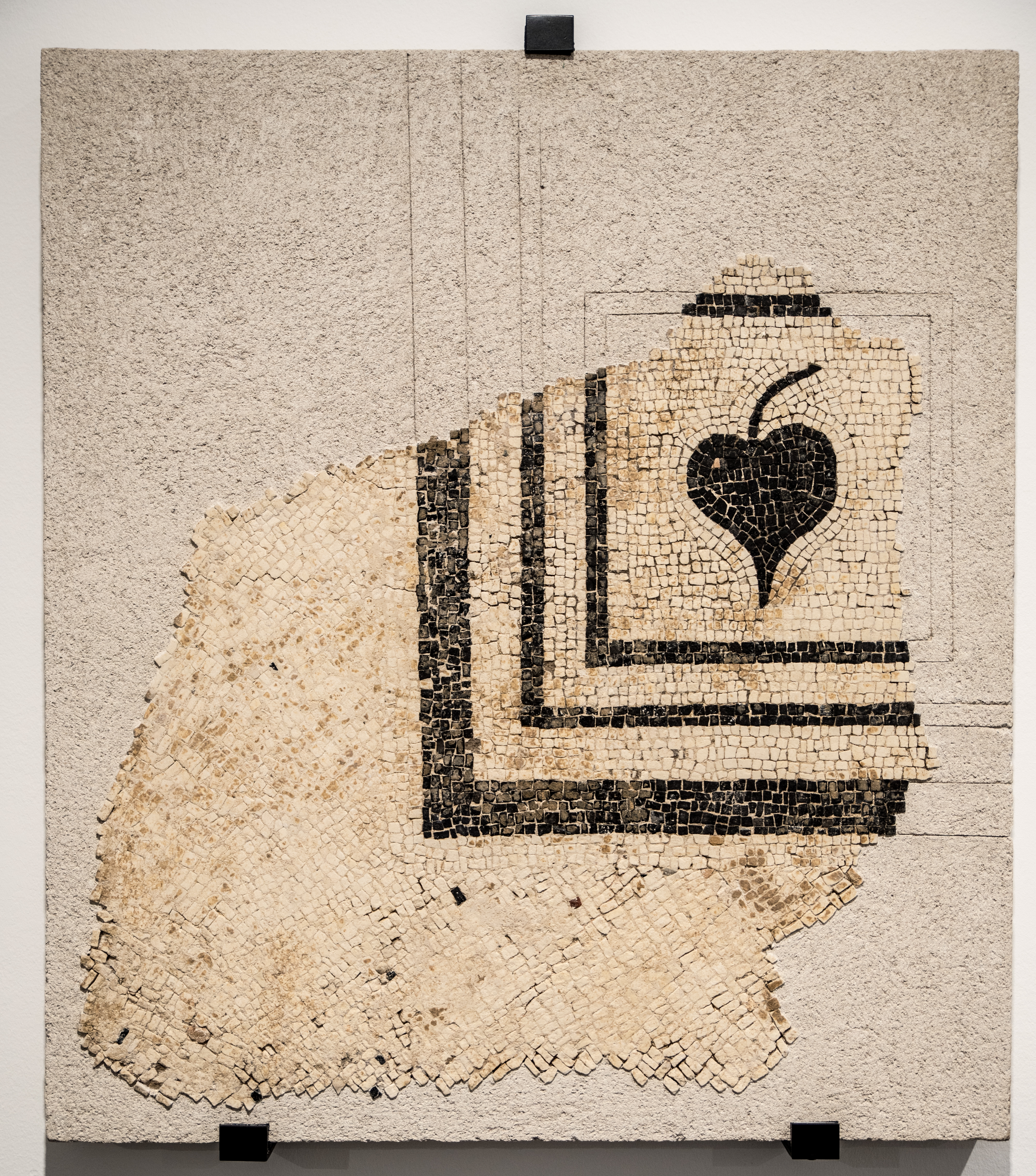 Fragment de mosaïque découvert en 1974 sur le site du pseudo-temple de Cybele, appurtenant au bains d'une grande domus, peut-être le palais du gouverneur romain - vers 20 av. J.-C. Claude, un empereur au destin singulier - Exposition au musée des Beaux-Arts de Lyon - 2018, catalogue p. 67